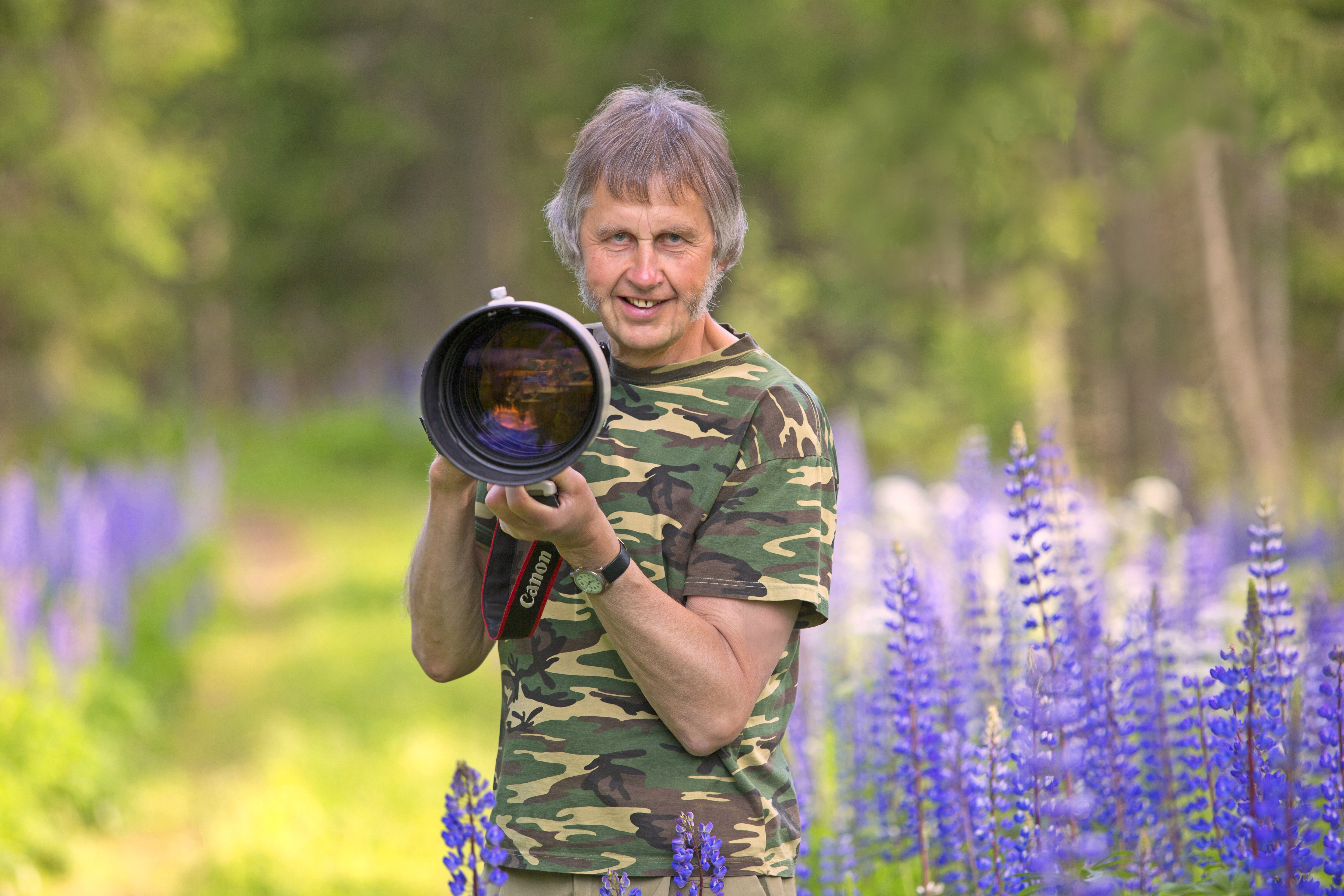 Reine Jonsson ute i naturen med sin kamerautrustning.